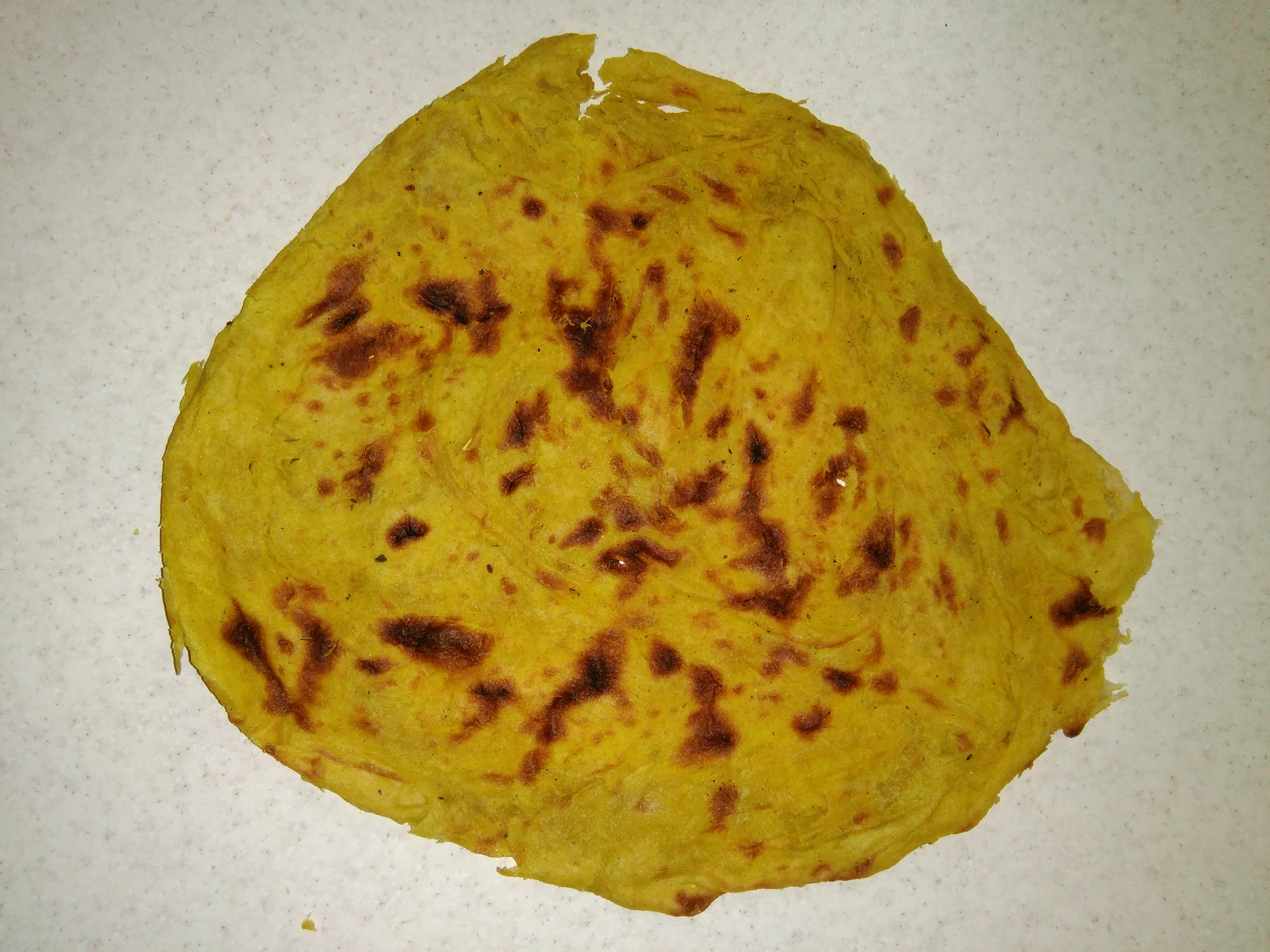 نان روغنی محلی ایرانی که در پخت آن از روغن استفاده شده است به همراه افزودنی های دیگر